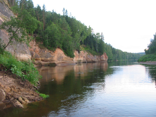 Koiva keskjooks Cēsise ja Sigulda vahel. Paljanduvad Amata lademe (Devoni ladestu) liivakivid.